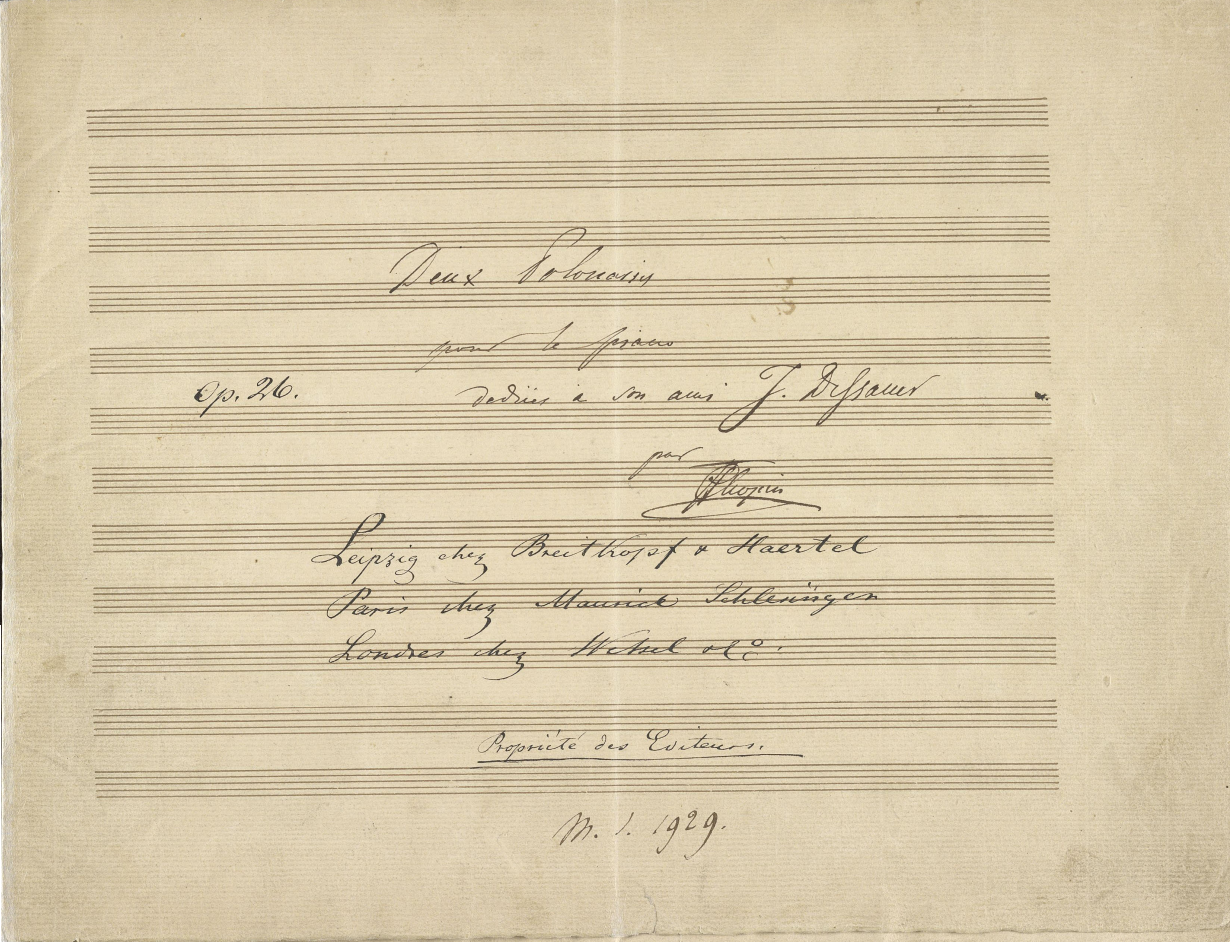 Couverture du manuscrit autographe des Polonaises Opus 26 de Frédéric Chopin.